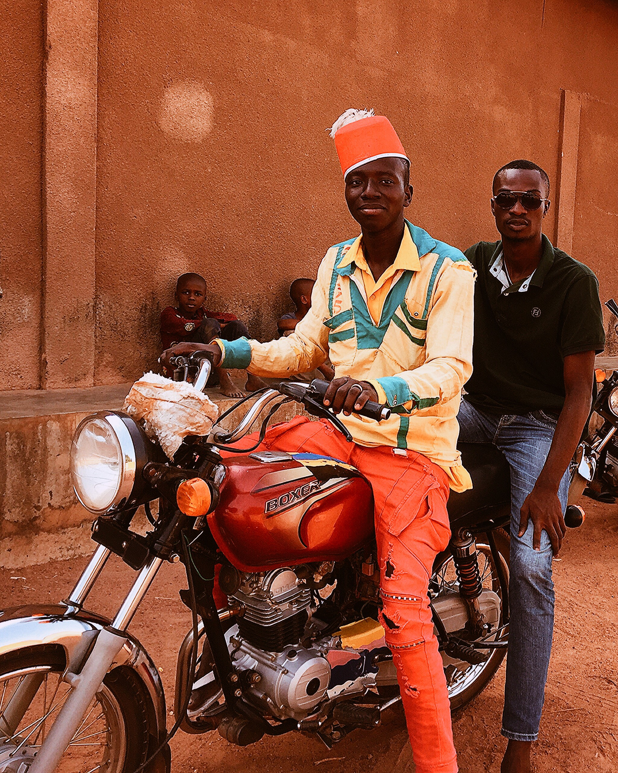 Cette image décrit un zem transportant un homme. En effet, le zémidjan est le moyen de transport ou de déplacement le plus usé au Bénin. This is an image with the theme "Africa on the Move or Transport" from: Benin